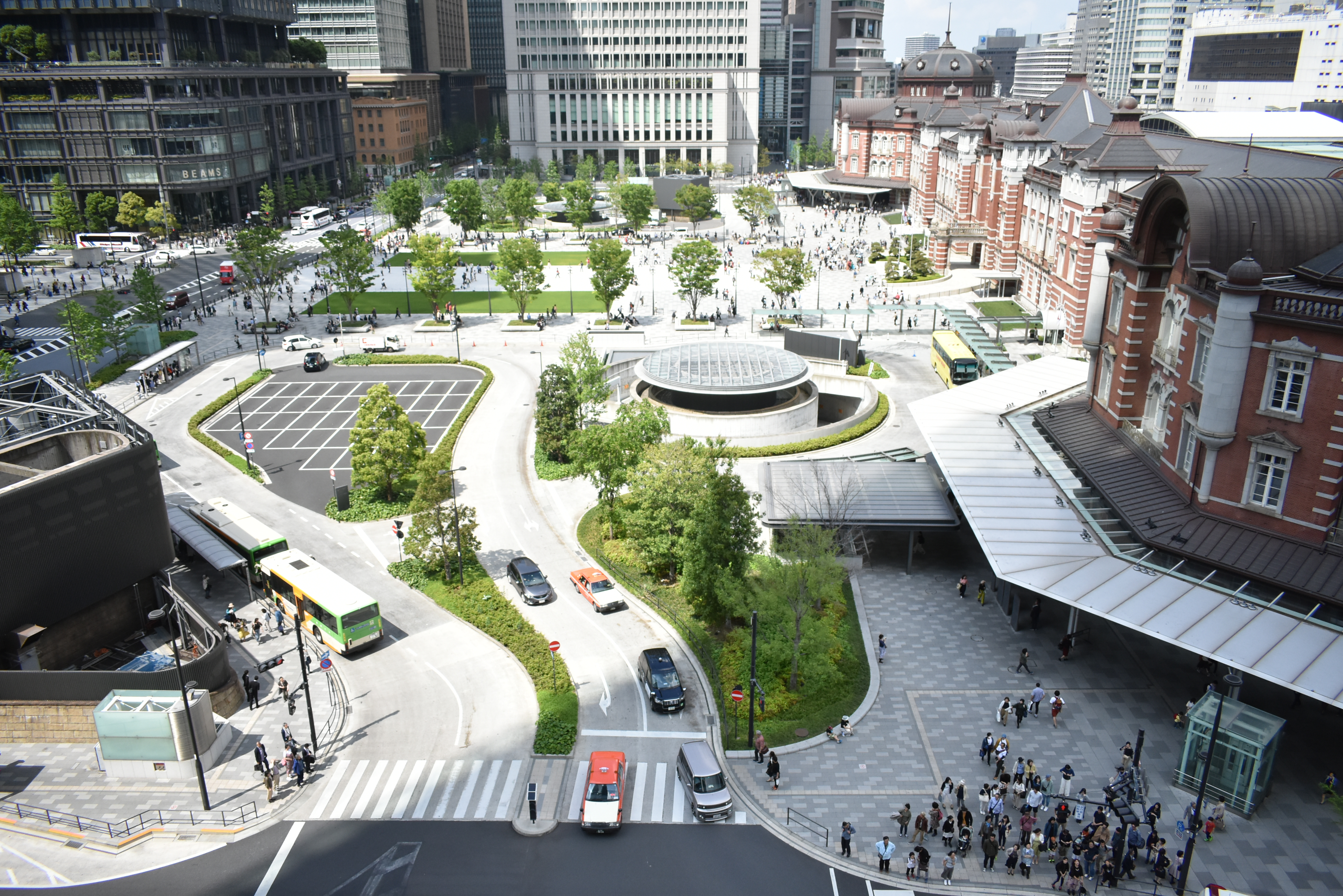 東京駅丸の内広場 Nikon D3400